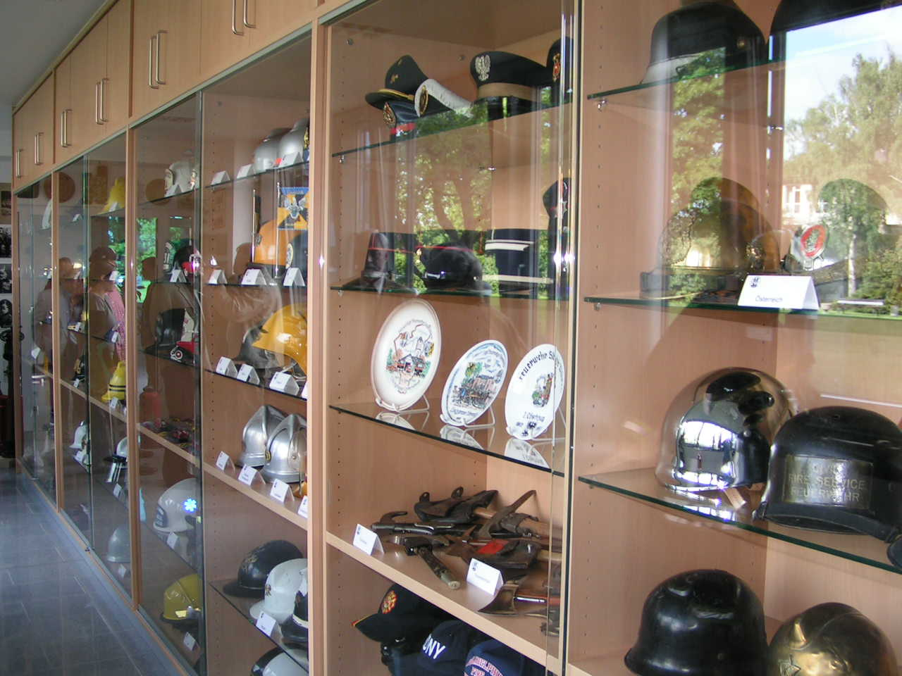 Teilansicht des Feuerwehrmuseums in Lendersdorf